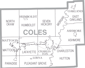 Coles County Illinois